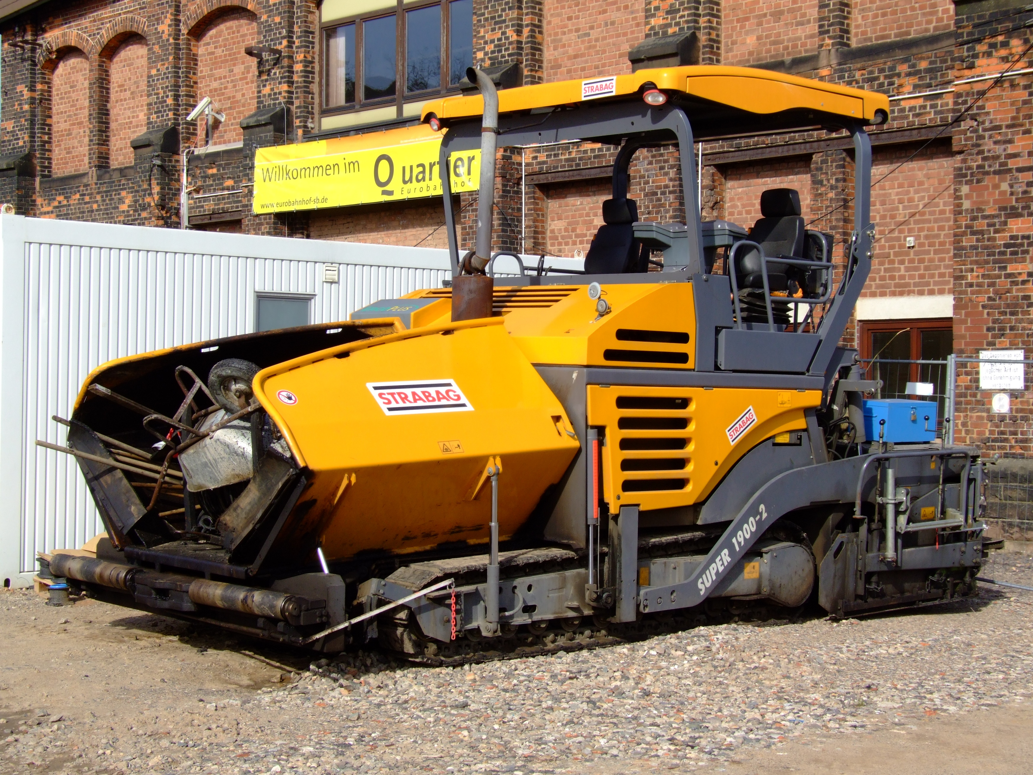 Strabag Super 1900